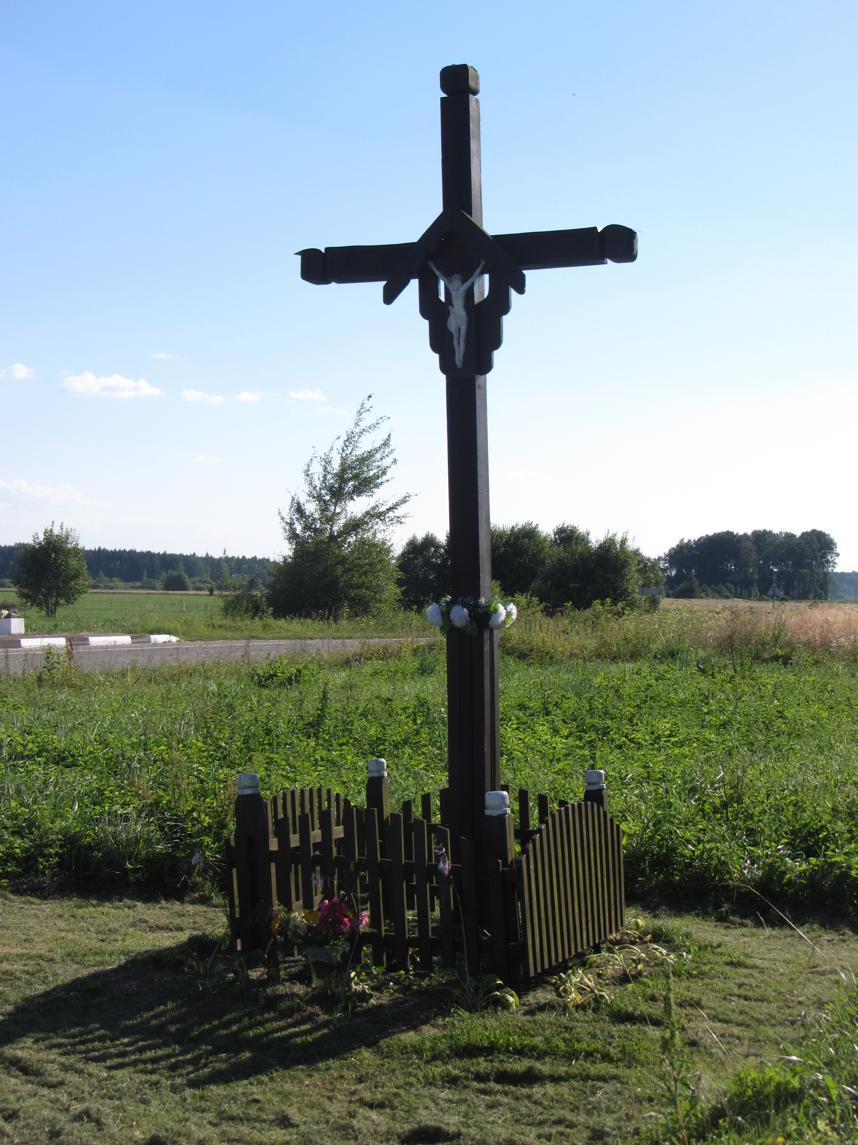 Gavėniai 19128, Lithuania